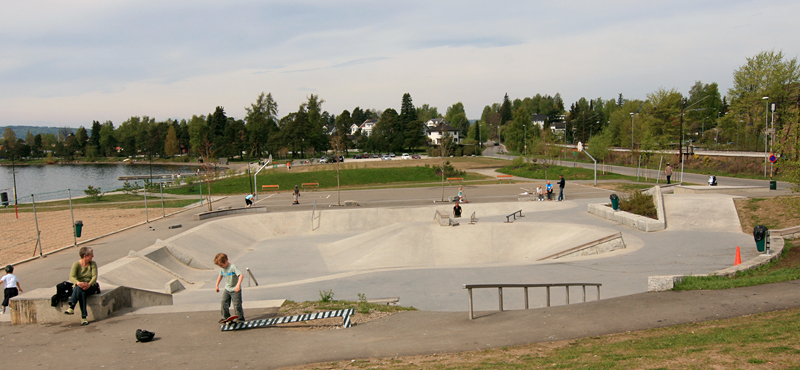 Koigen skatepark, Hamar, Norway